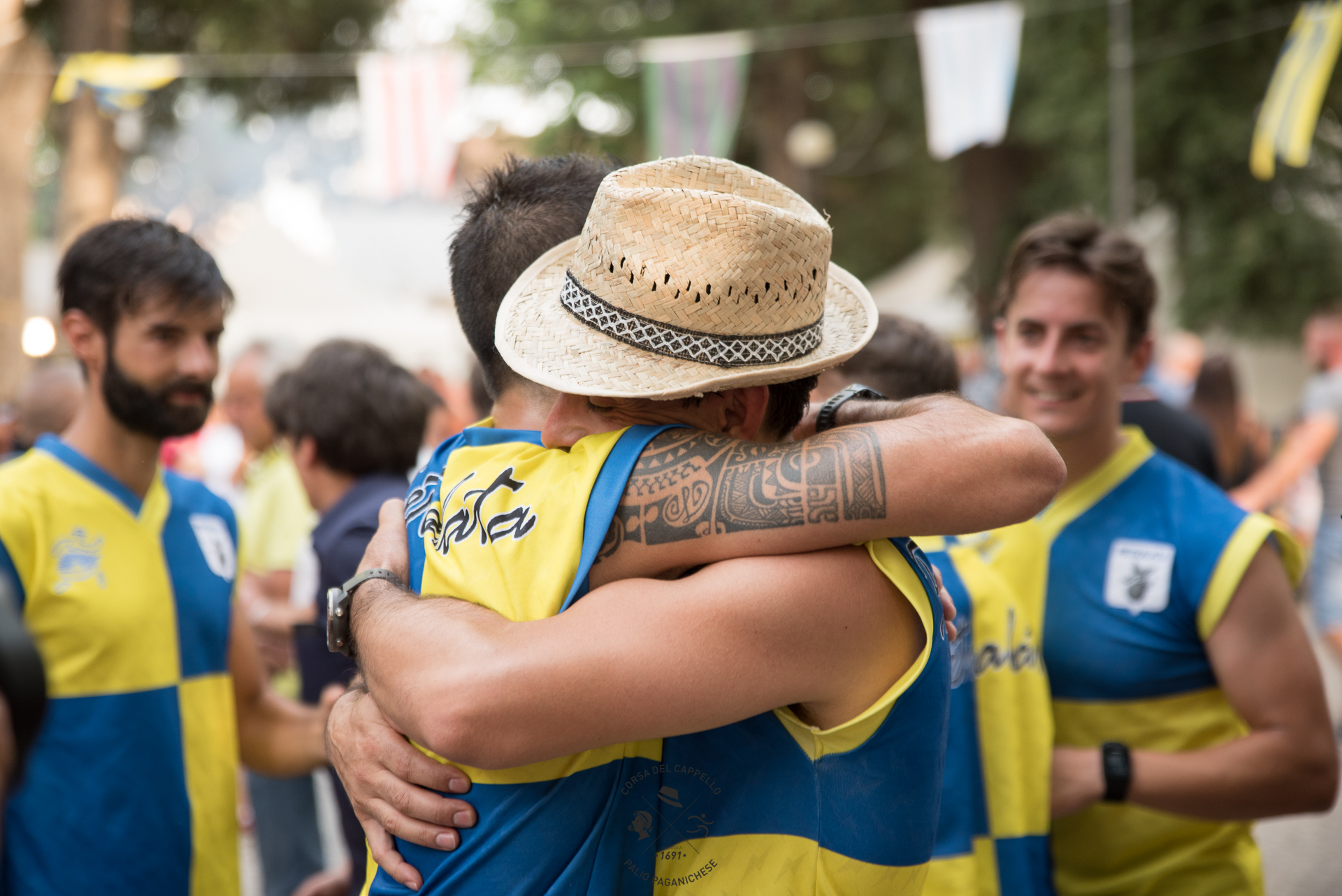 Paganica (AQ): Corsa del Cappello 2018